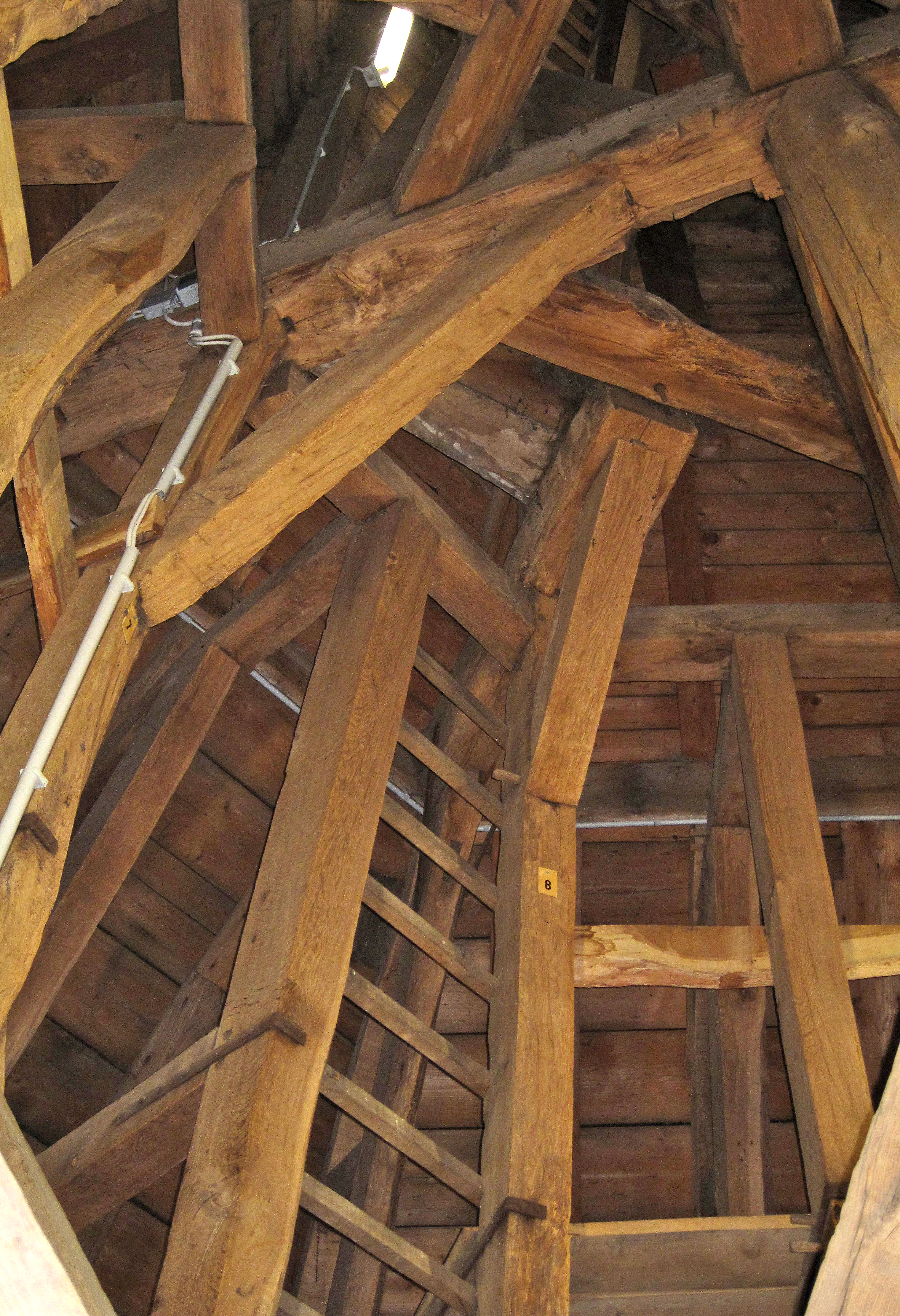 Holzkonstruktion (Dachgestühl Zwiebelturm) Margarethenkirche (Baudenkmal), Am Kirchplatz in Kierspe.